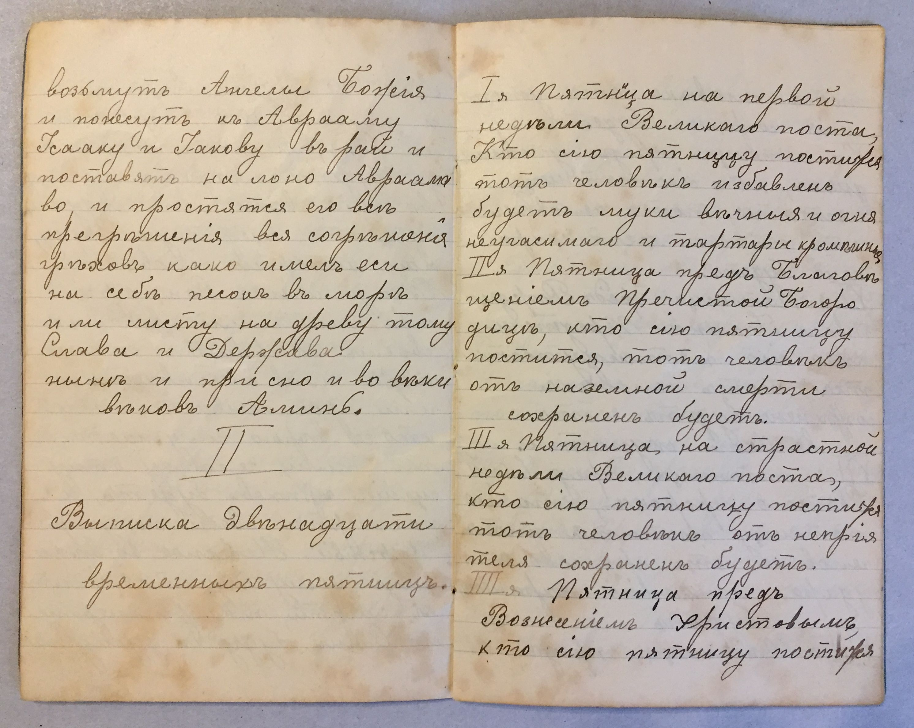 Апокриф "Выписка двенадцати временных пятниц" Рукописный сборник, конец 19 века.